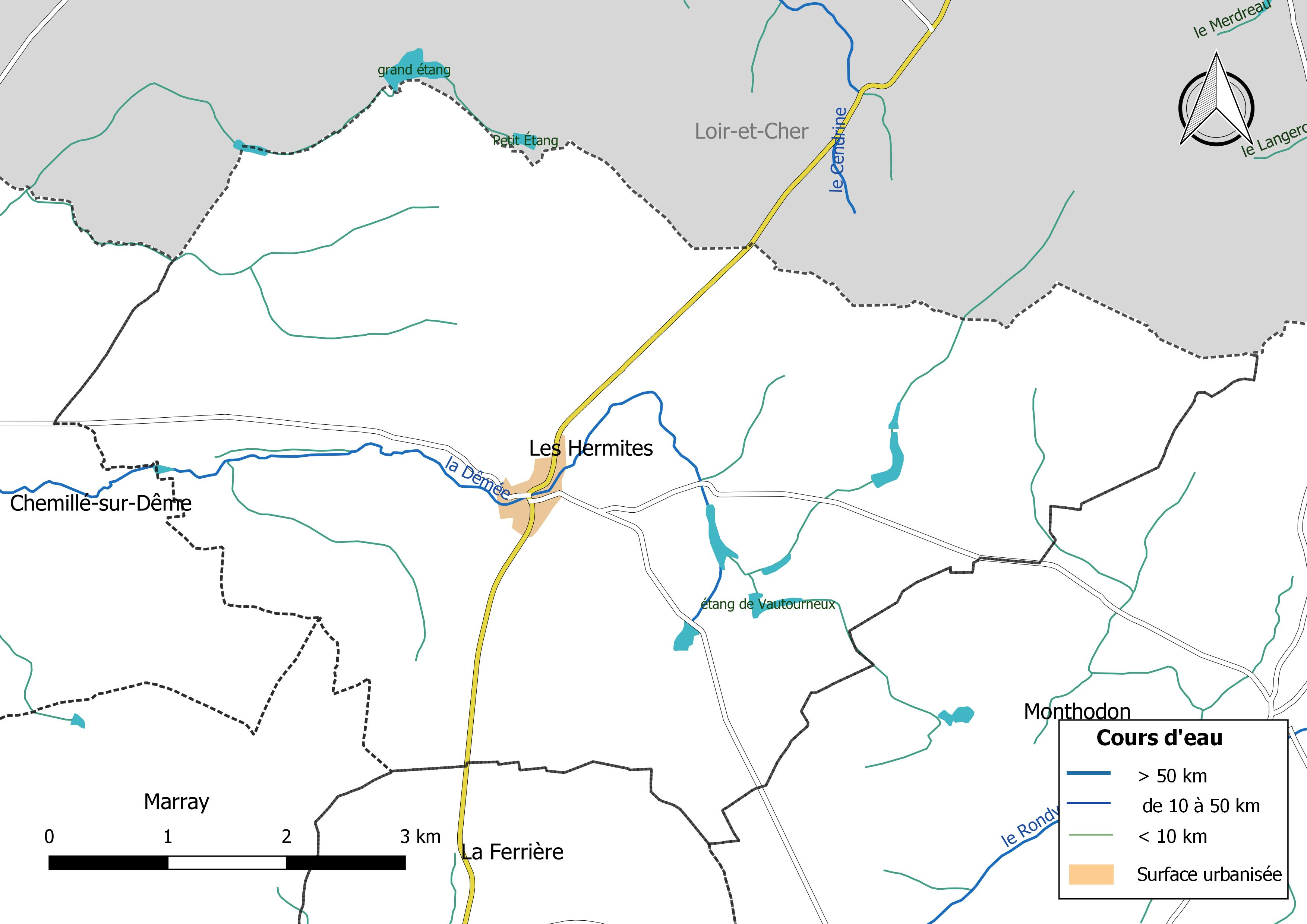 Carte du réseau hydrographique de la commune de Les Hermites (France).